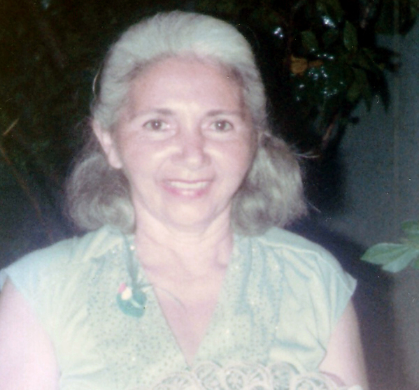 Ángela Valle nació en Comayagüela, Honduras, en 1927